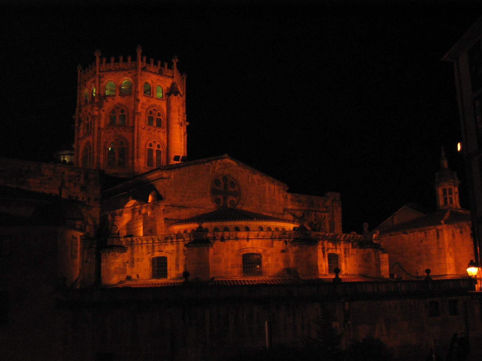 Vista nocturna de la Catedral de Ourense desde la Plaza del Corregidor